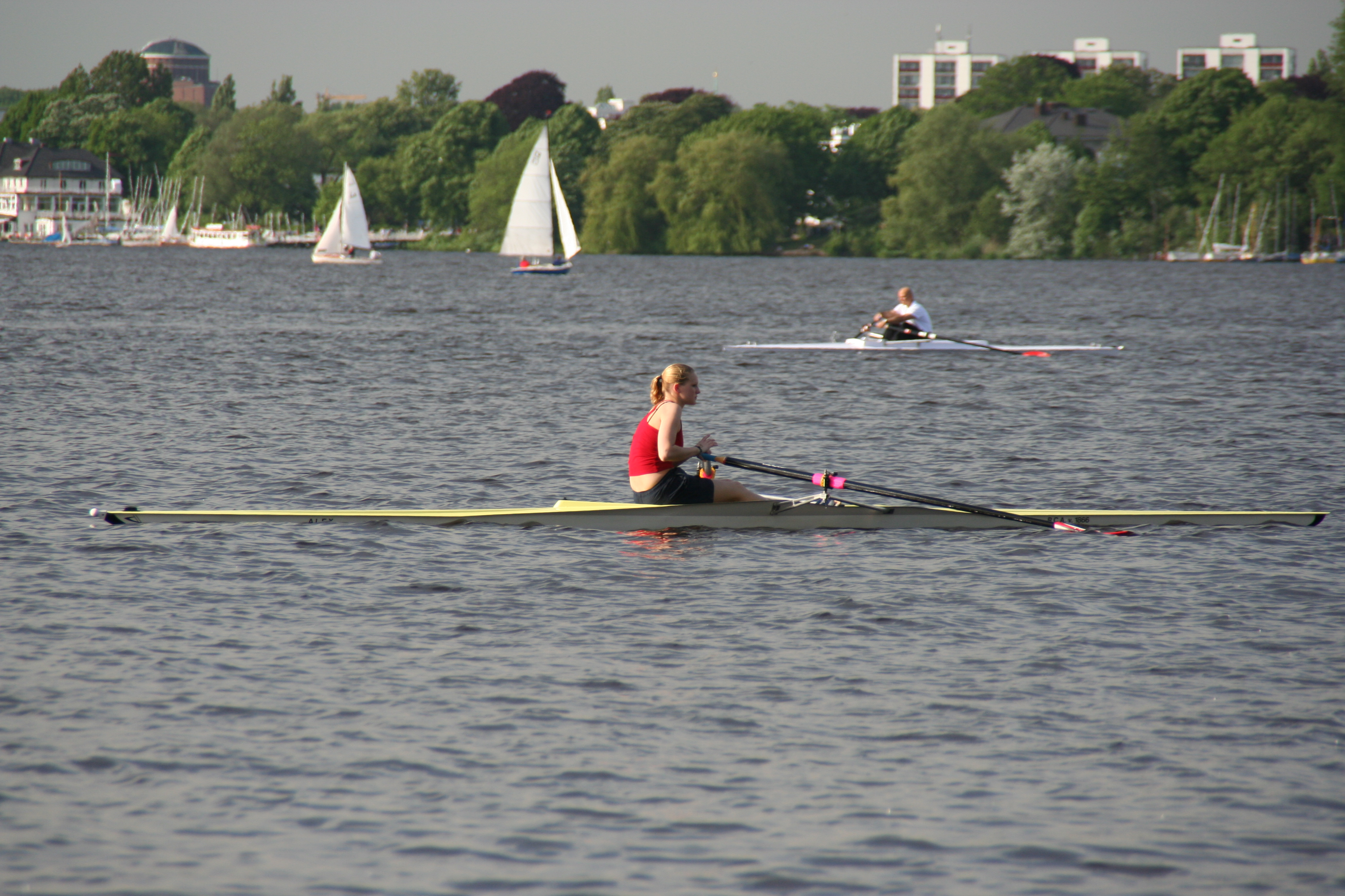 Hamburg 2005-05-26/29 Lukas KURTZ Aussenalster